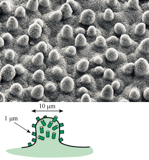 Lotosový efekt